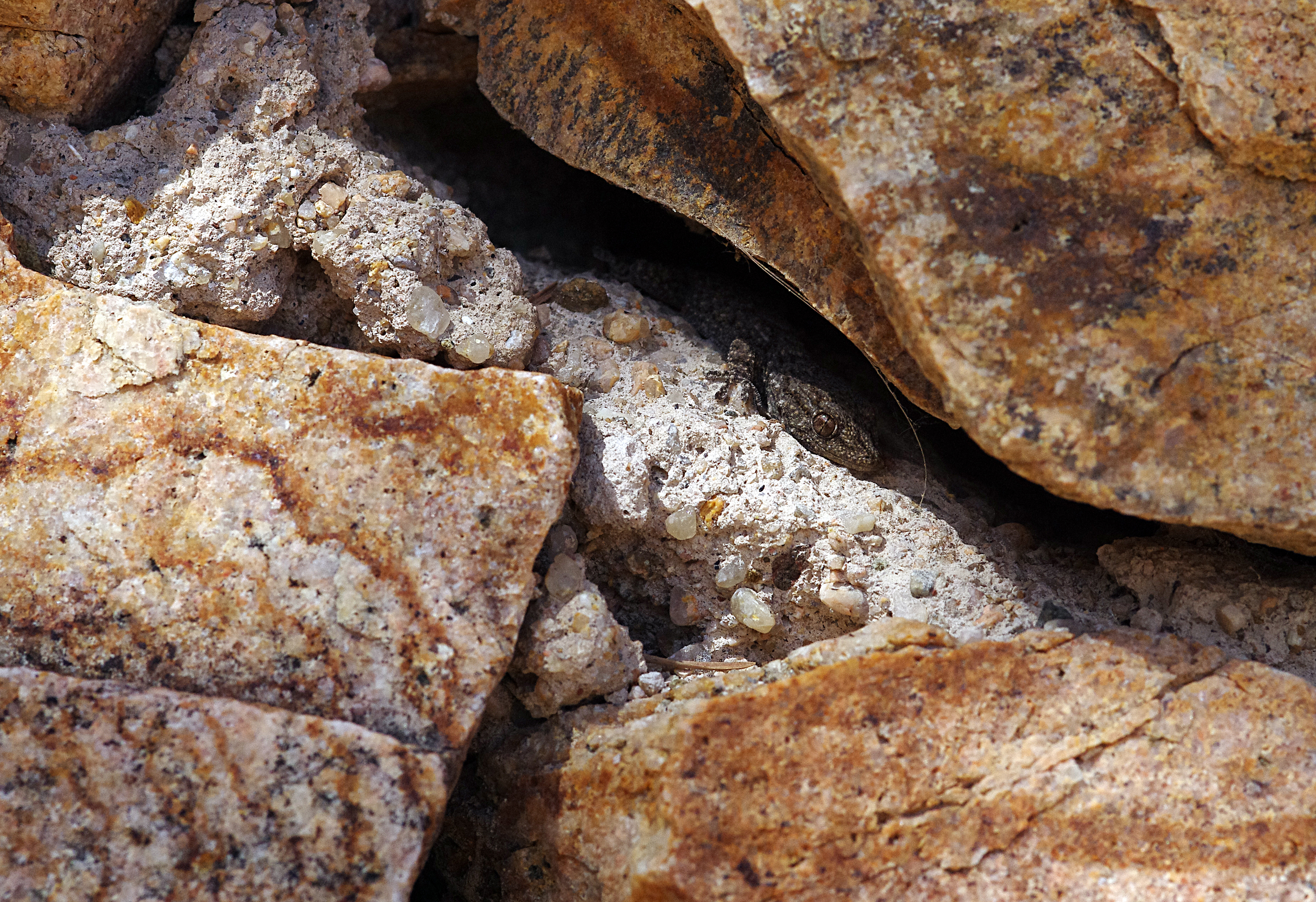 Mauergecko beim Sonnenbad